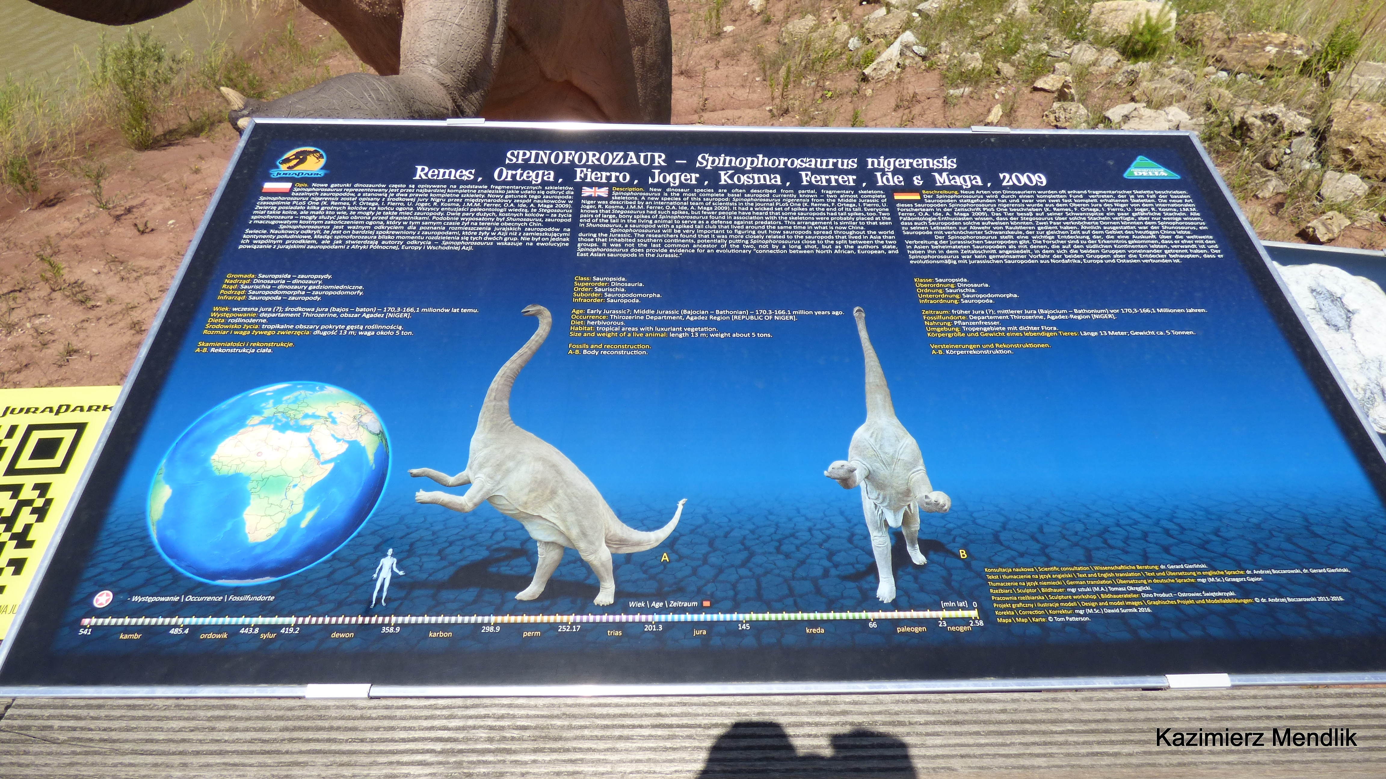 Jura Park Krasiejów - Widok z terenu parku